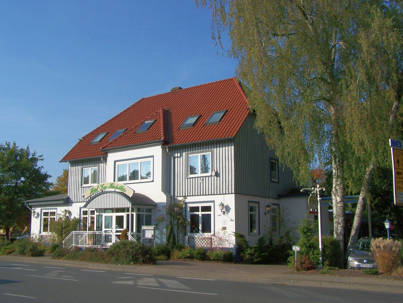 Hotel zur Heideblüte in Ovelgönne (Hambühren)